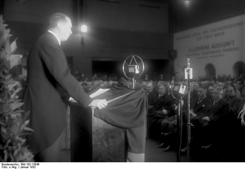 Die Eröffnung der 7. Grünen Woche in den Ausstellungshallen am Kaiserdamm in Berlin ! Der Berliner Oberbürgermeister Dr. Sahm am Rednerpult während der Eröffnungsrede.